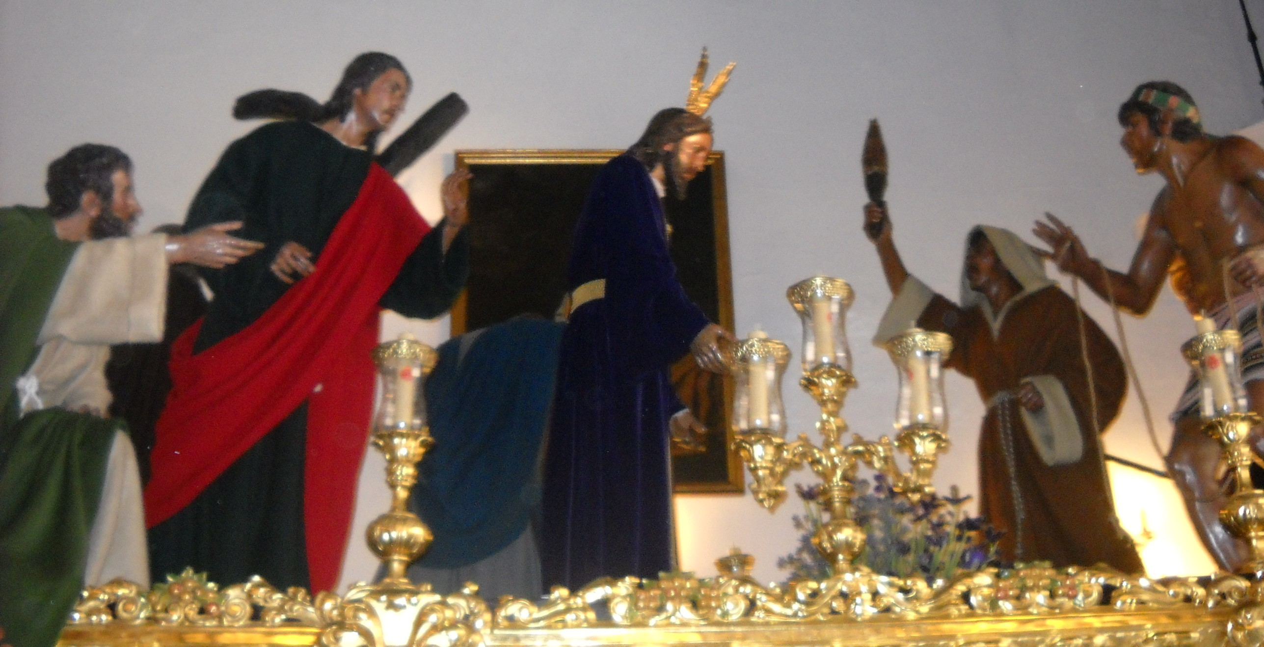 Misterio del Prendimiento de Cristo